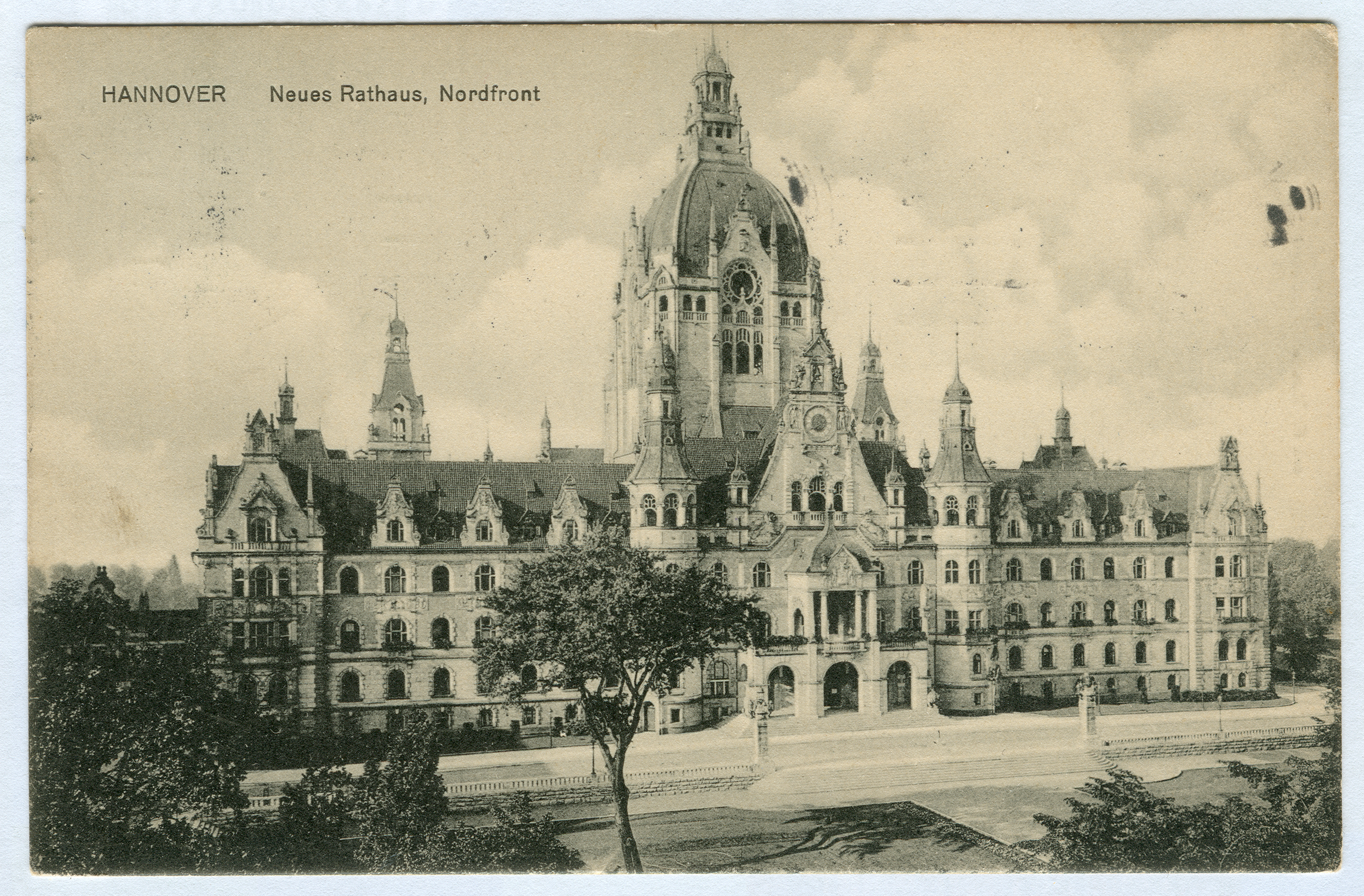 Hannover, Neues Rathaus, Nordfront. Fotografien von Karl Friedrich Wunder mit Vor- und Rückseite